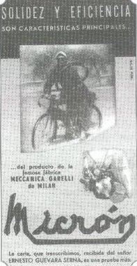 Ernesto Guevara en su bicicleta con motor. Propaganda empresa Micrón. 1950